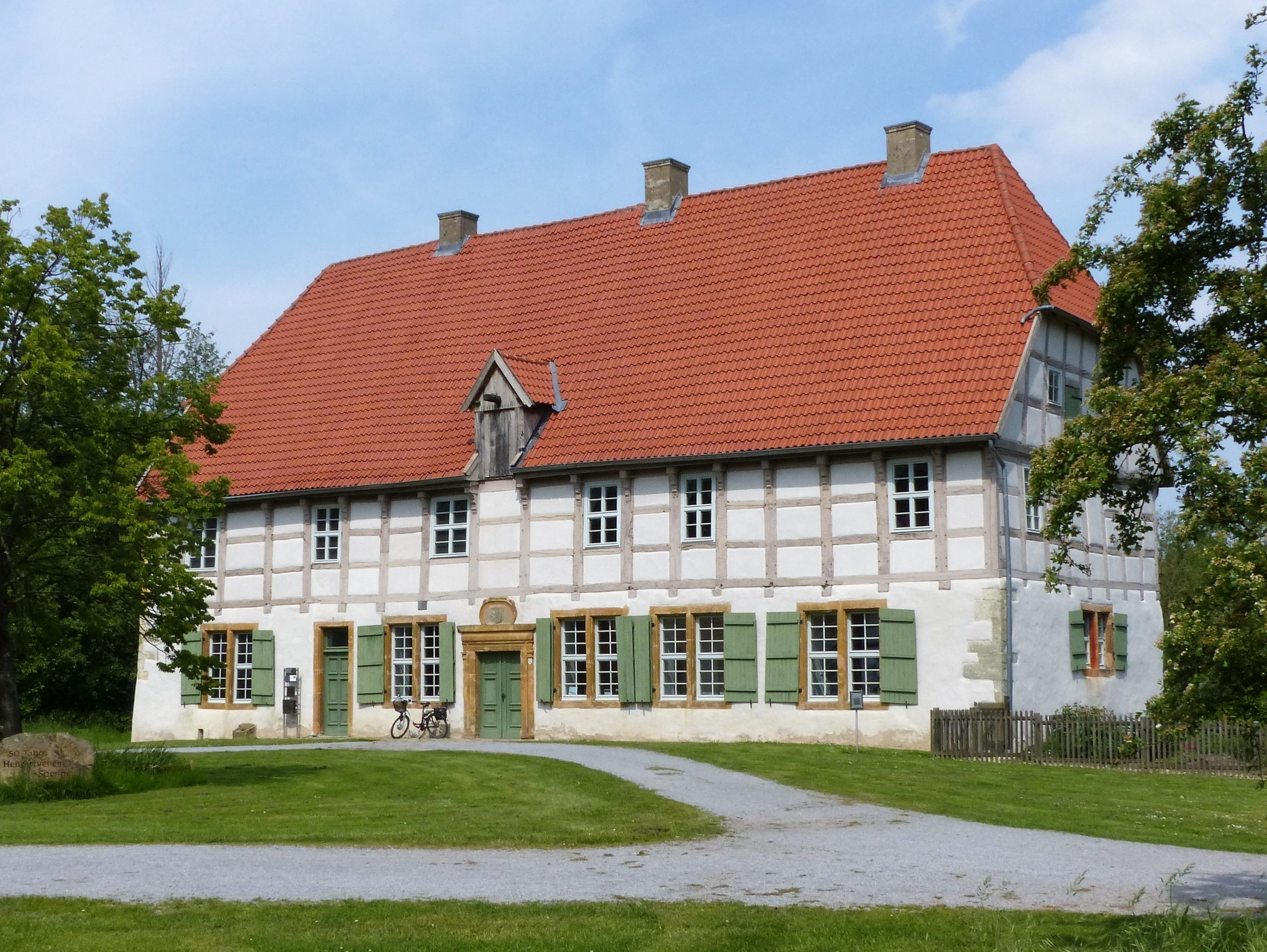 Herrenhaus der Werbrug Spenge, Zustand 2019